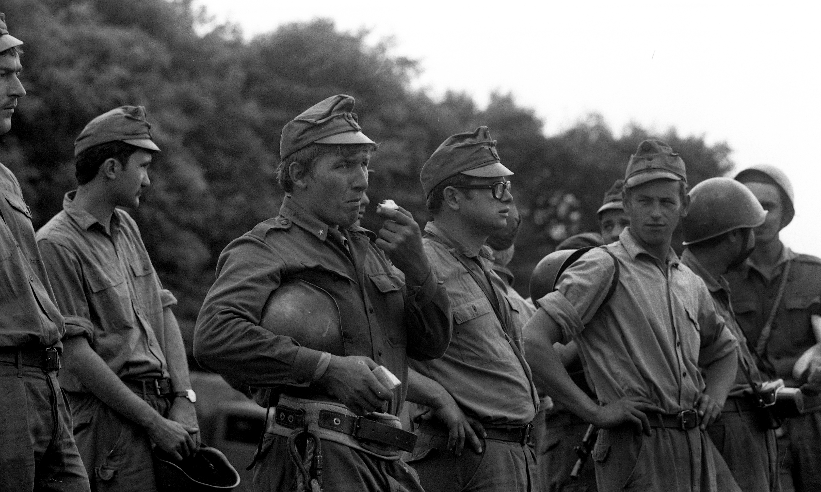 a vasúti viadukt bontását robbantással végző katonák. Location: Hungary, Husztót Title: a vasúti viadukt bontását robbantással végző katonák.